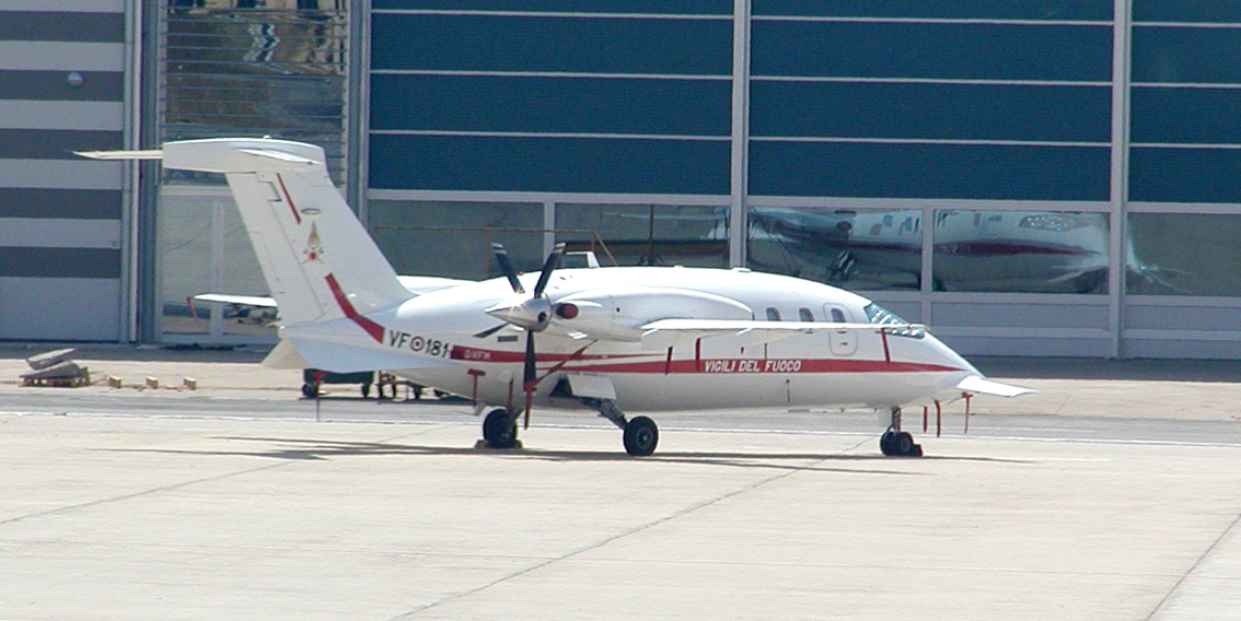 Piaggio P180 Avanti der "vigili del fuoco" in Rom-Ciampino, tail number YF-181